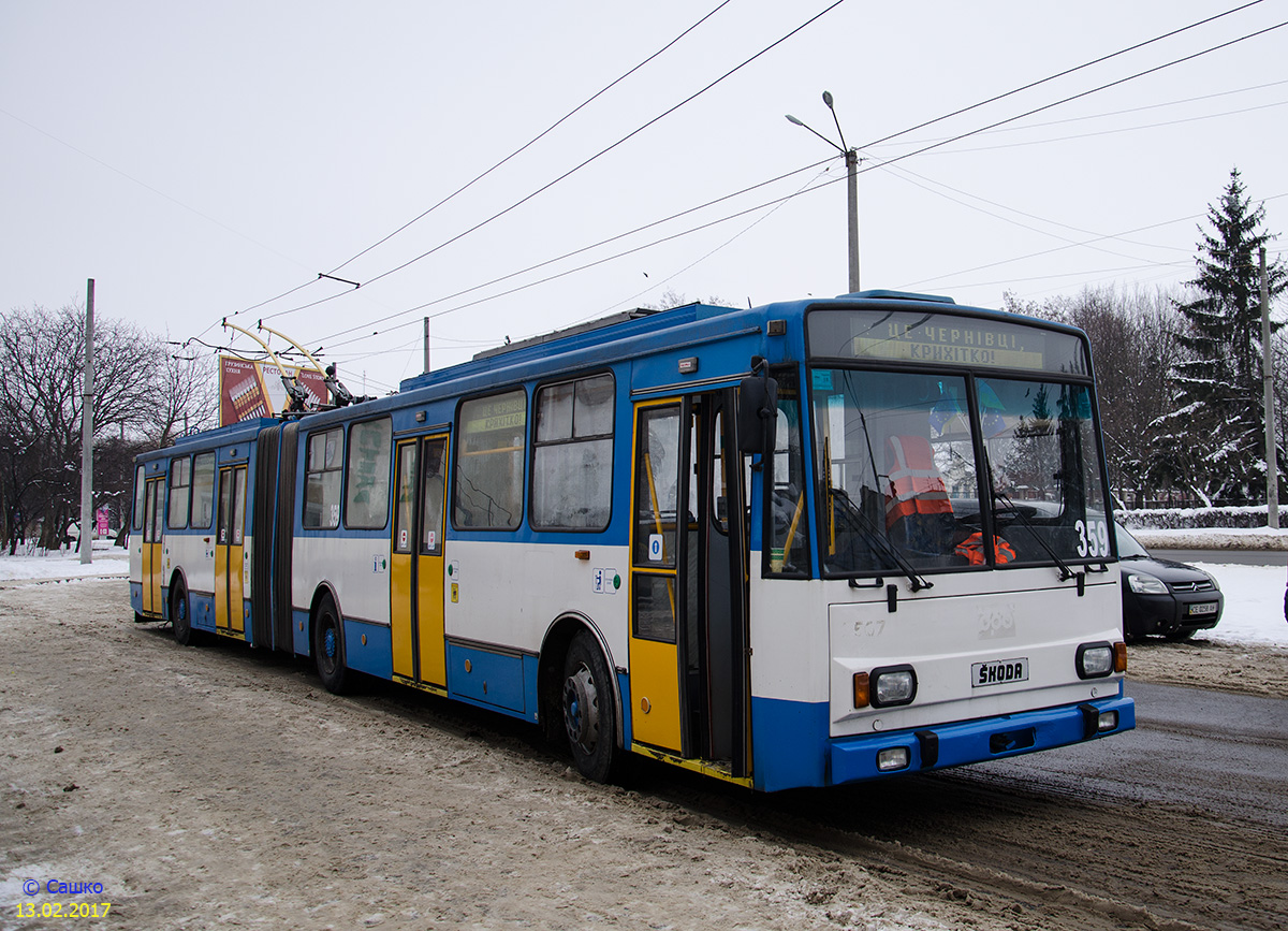 Škoda 15TrM в Чернівцях, що раніше працював в Остраві, на кінцевій зупинці "Училище №15